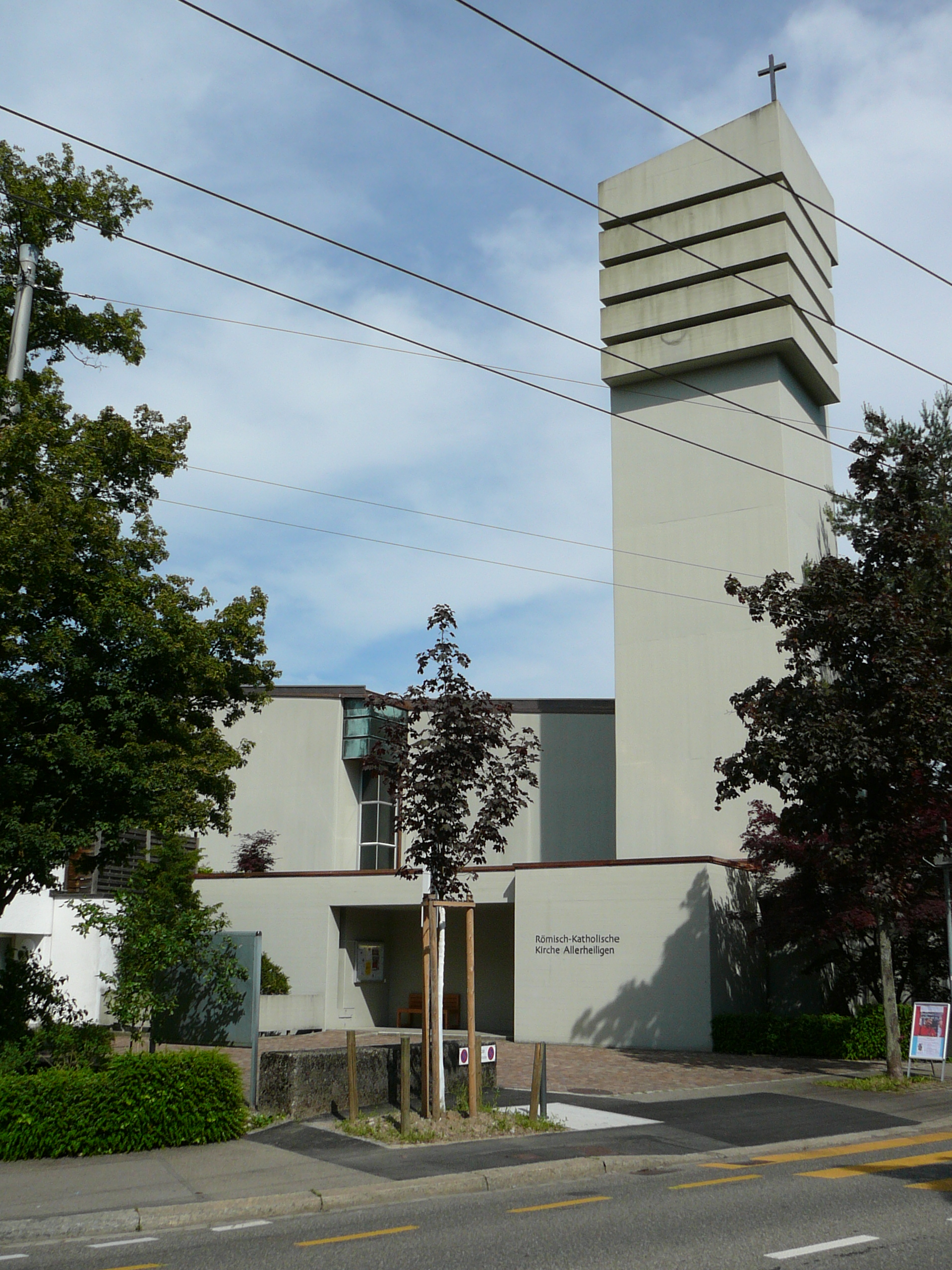 Römisch-katholische Pfarrkirche Allerheiligen, Zürich-Neuaffoltern